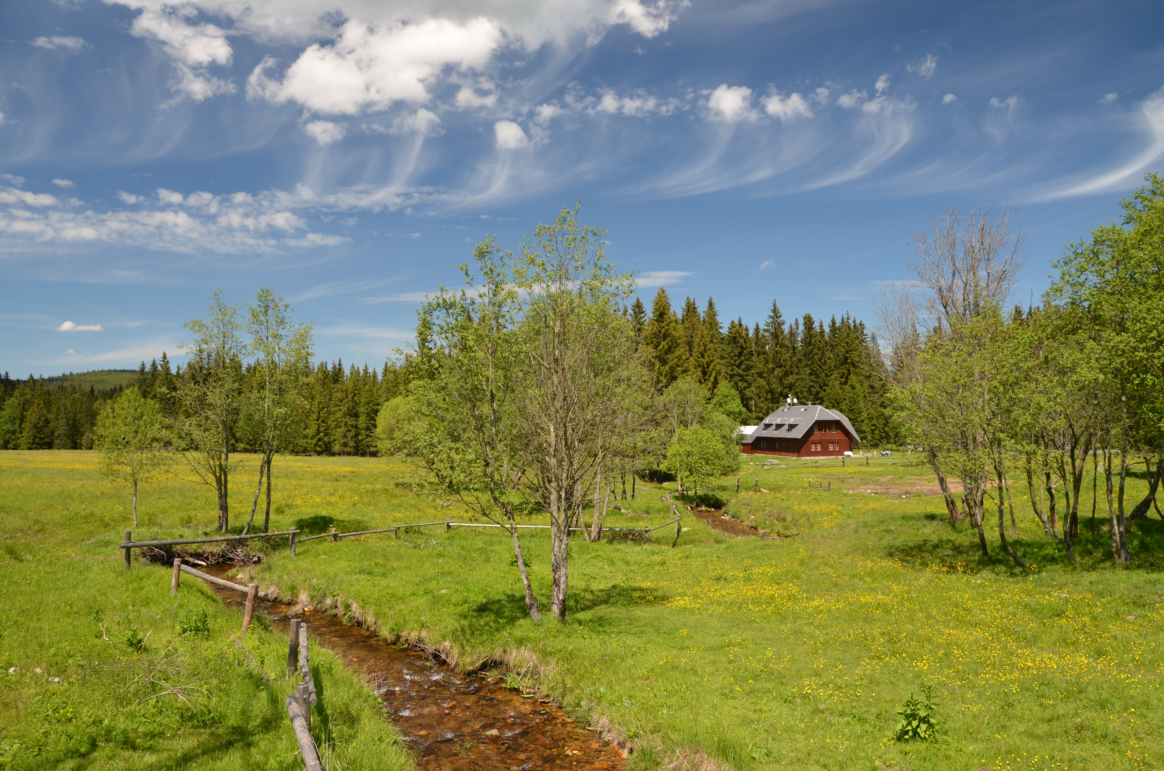 Nová Hůrka, část obce Prášily, Plzeňský kraj